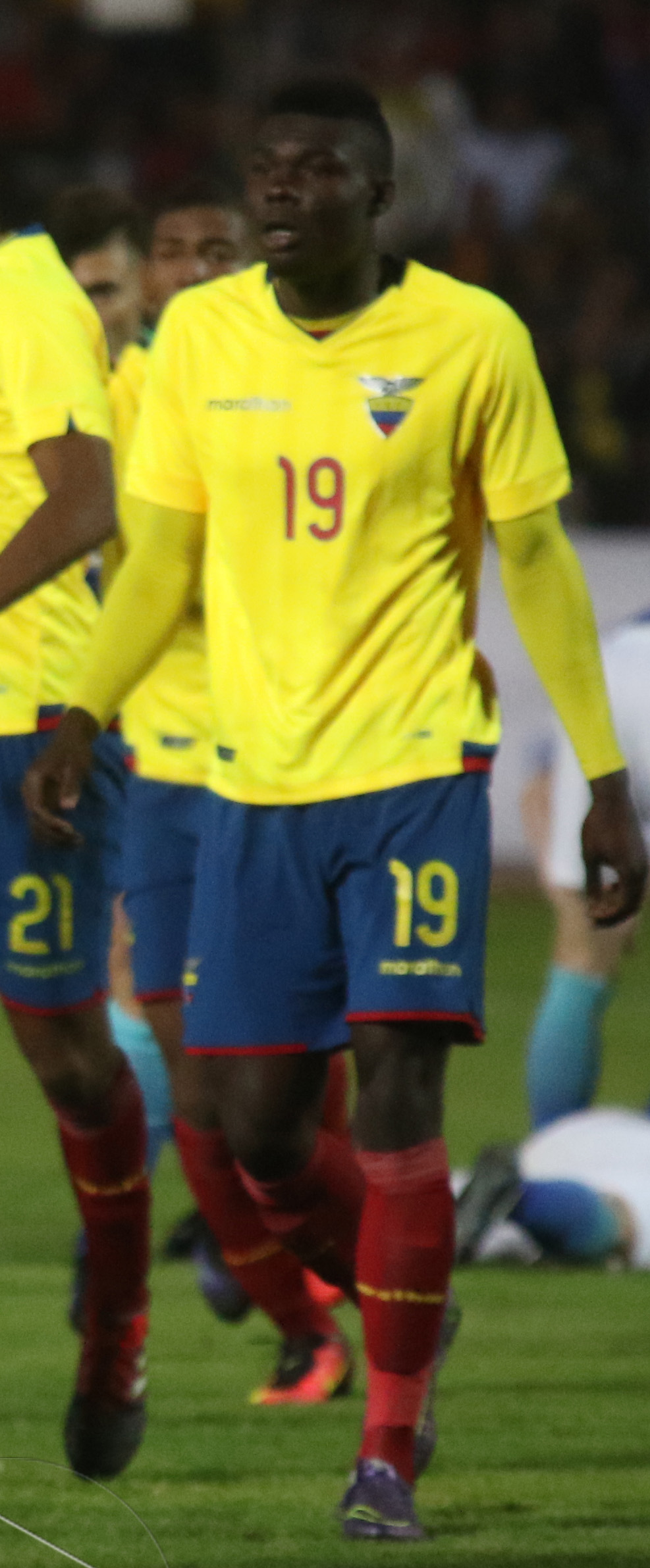 Riobamba, Ecuador, 18 enero 2017 (Andes).- El combinado ecuatoriano dirigido por Javier Rodríguez cayó 1-0 este miércoles ante Brasil en el marco de la primera jornada del Grupo A del Campeonato Sudamericano Sub 20 Ecuador 2017, durante el partido jugado en el estadio Olímpico de Riobamba (centro andino), abarrotado de hinchas. ANDES/Micaela Ayala V.